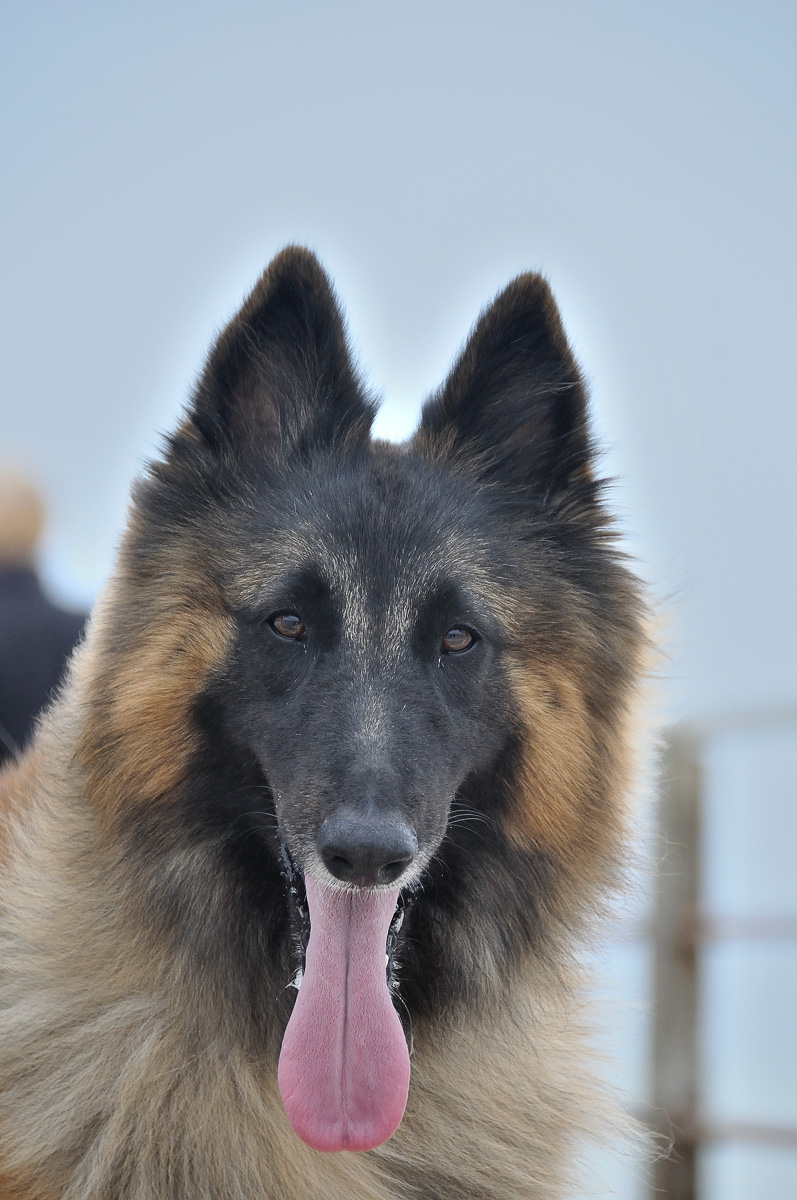 Chien